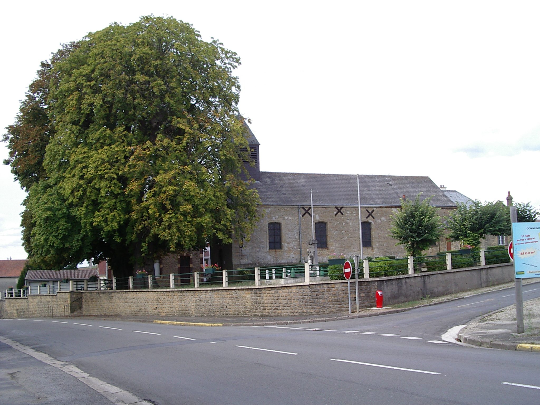 L'église, consacrée à Saint Rémy : Blagny est une commune française, située dans le département des Ardennes et la région Champagne-Ardenne.